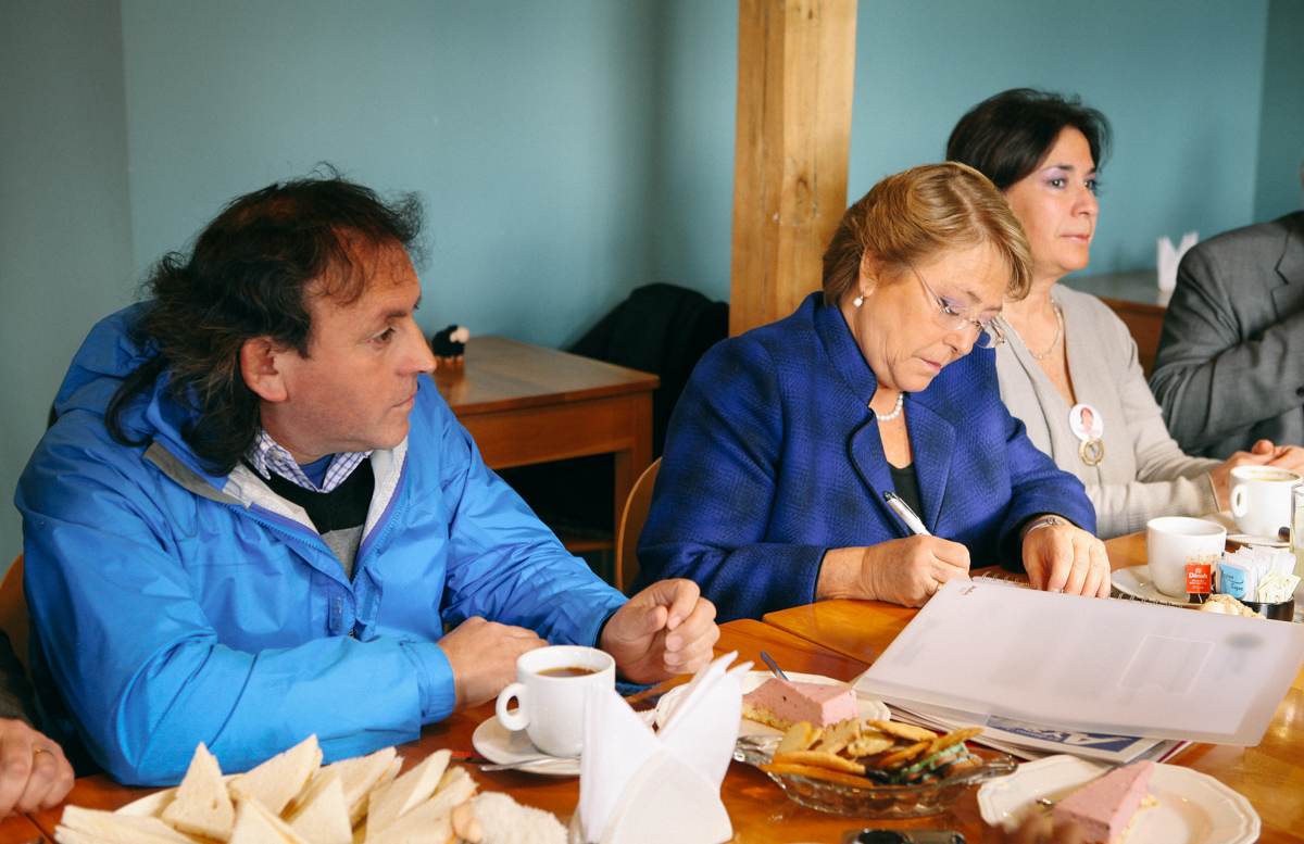 Iván Fuentes y Michelle Bachelet.